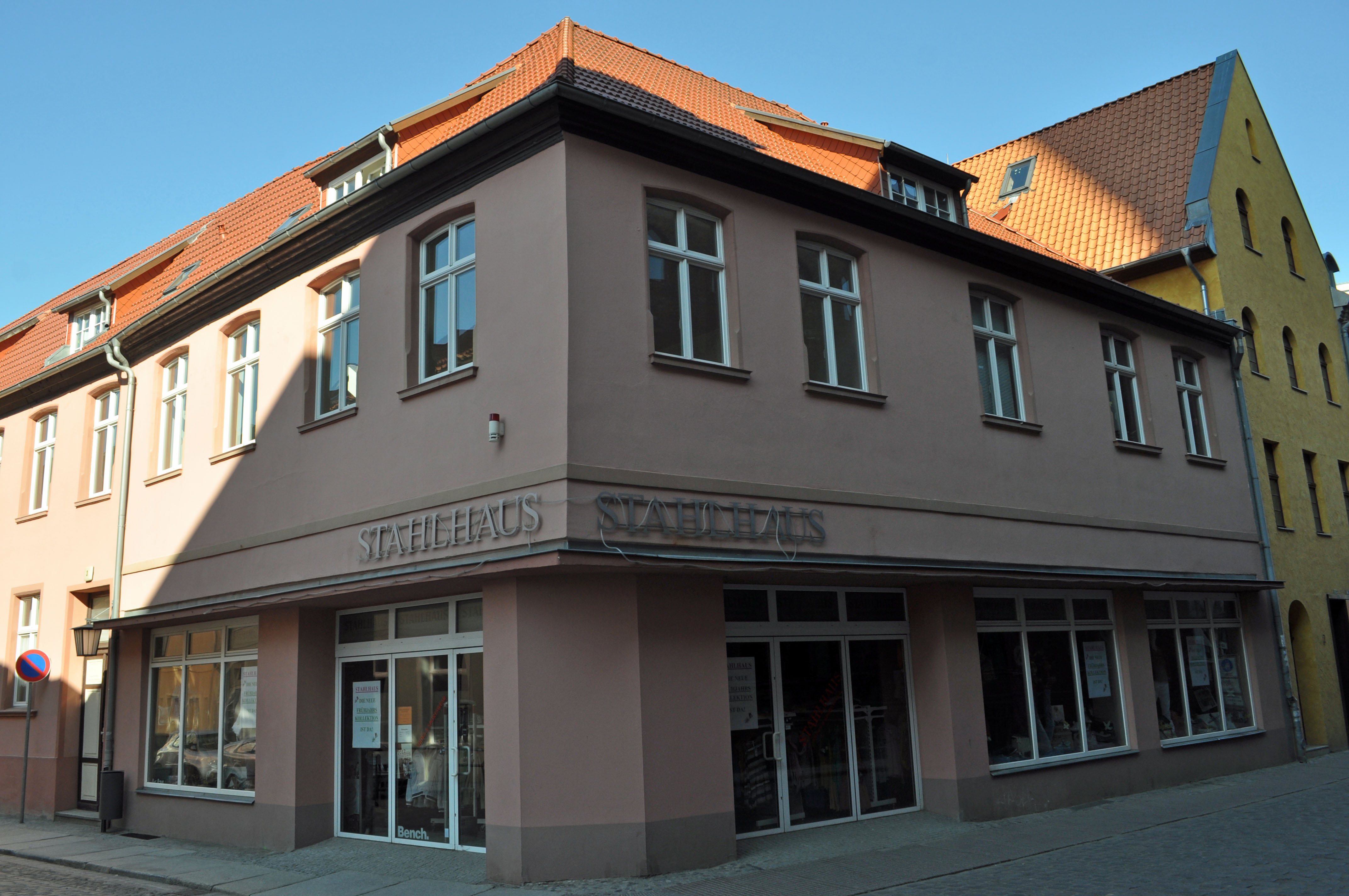 Gebäude bzw. Gebäudedetail in Stralsund. Straße und Hausnummer siehe Dateiname.